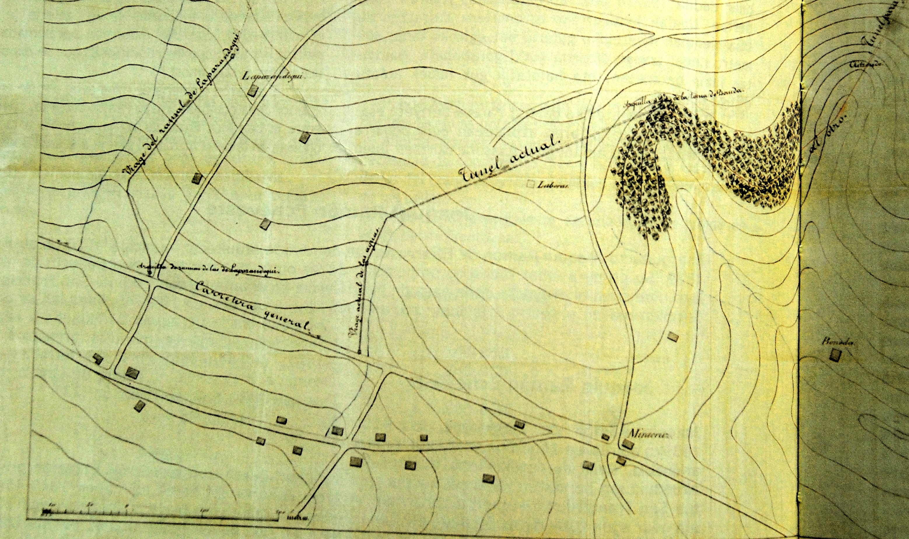 Errotazarretik eta Monedatik ( "Boneda" mapan) zetorren ubidearen planoaren zati bat, 1861ean eginda. Donostiako udal artxiboa.